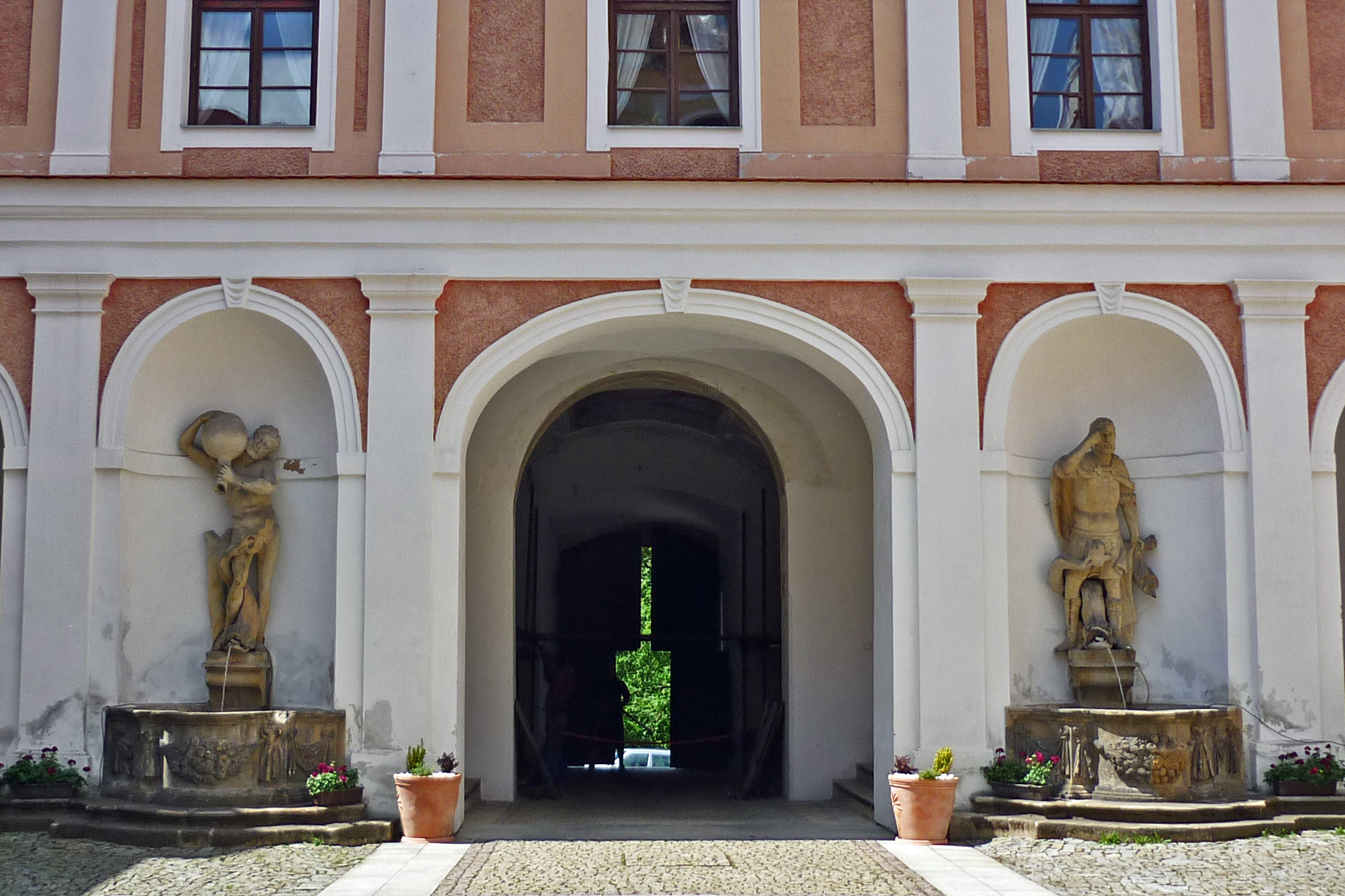 Schloss Rothenhaus bei Görkau in Nordböhmen (Červený Hrádek), Innenhof mit zwei Brunnenskulpturen: Odysseus (links) und der Zyklop Polyphem von Johann Brokoff (1687/88)